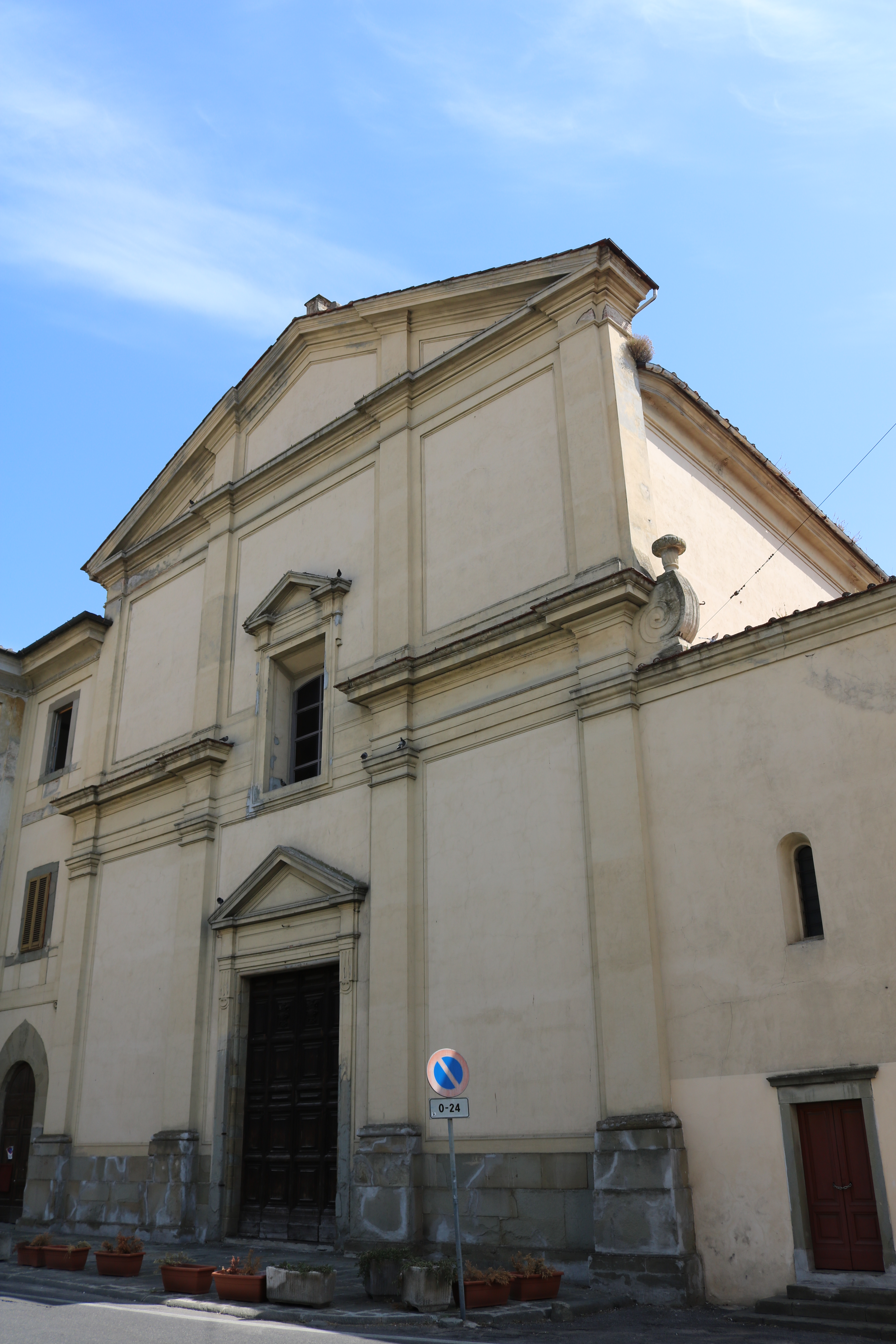 Chiesa della Santissima Annunziata (Pistoia)